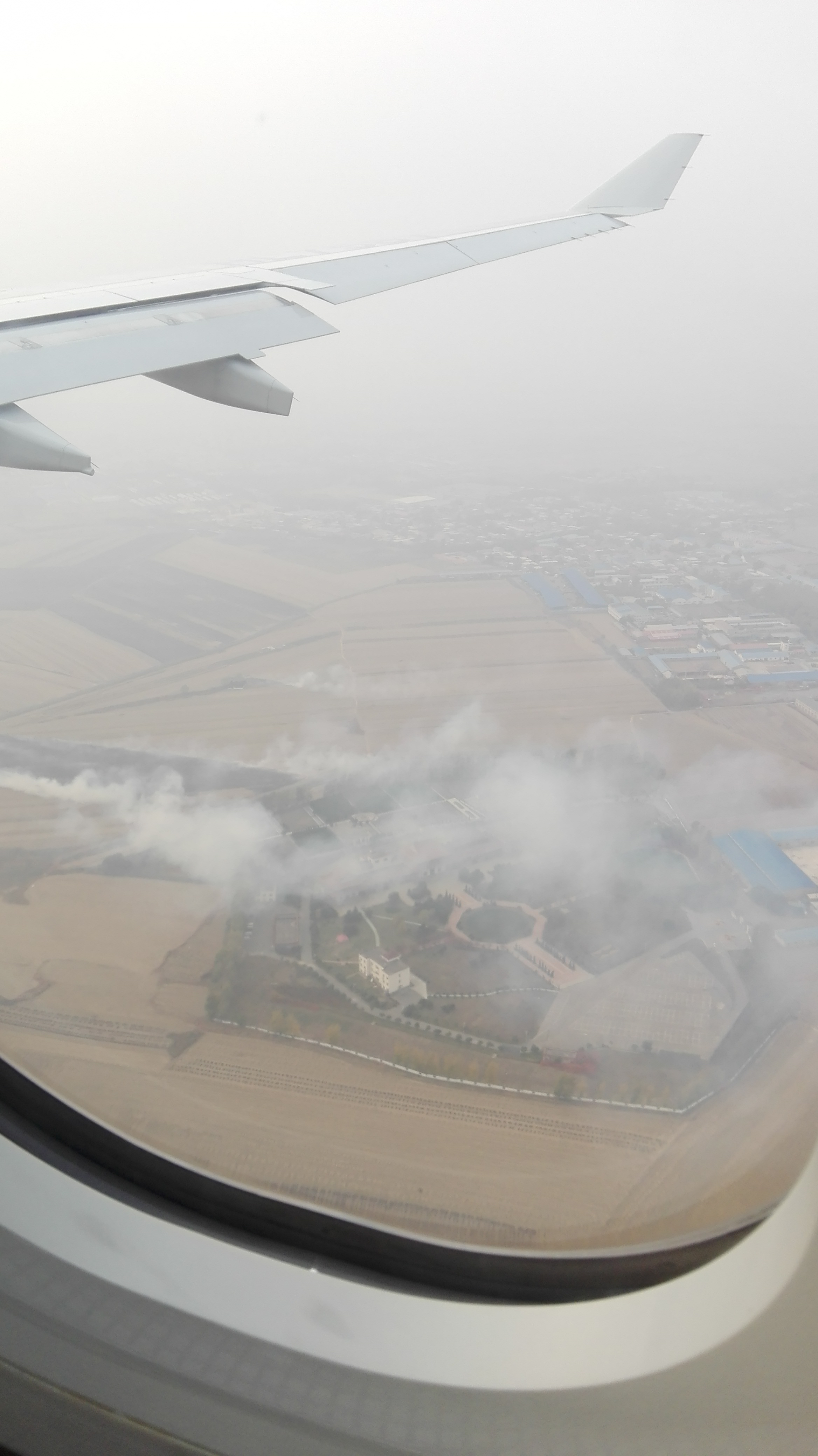 从高空看焚烧秸秆产生大量浓烟。